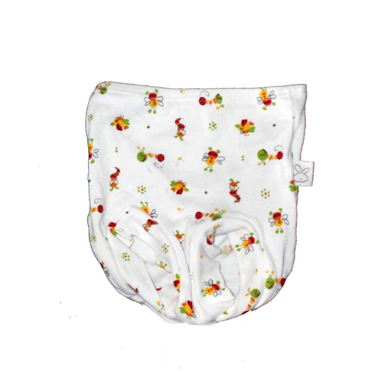 Ropa interior para el bebé